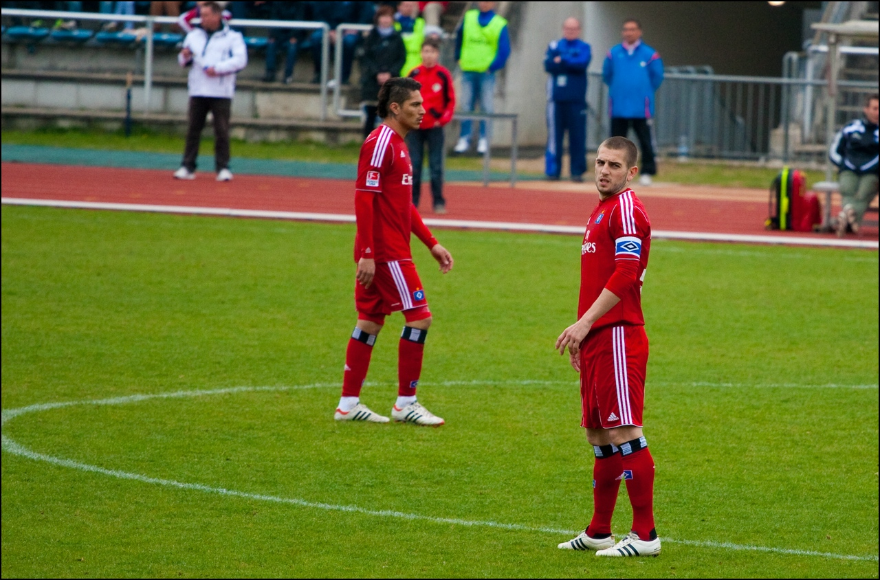 Paolo Guerrero jugando por el Hamburgo. Paolo Guerrero jugando por el Hamburgo.